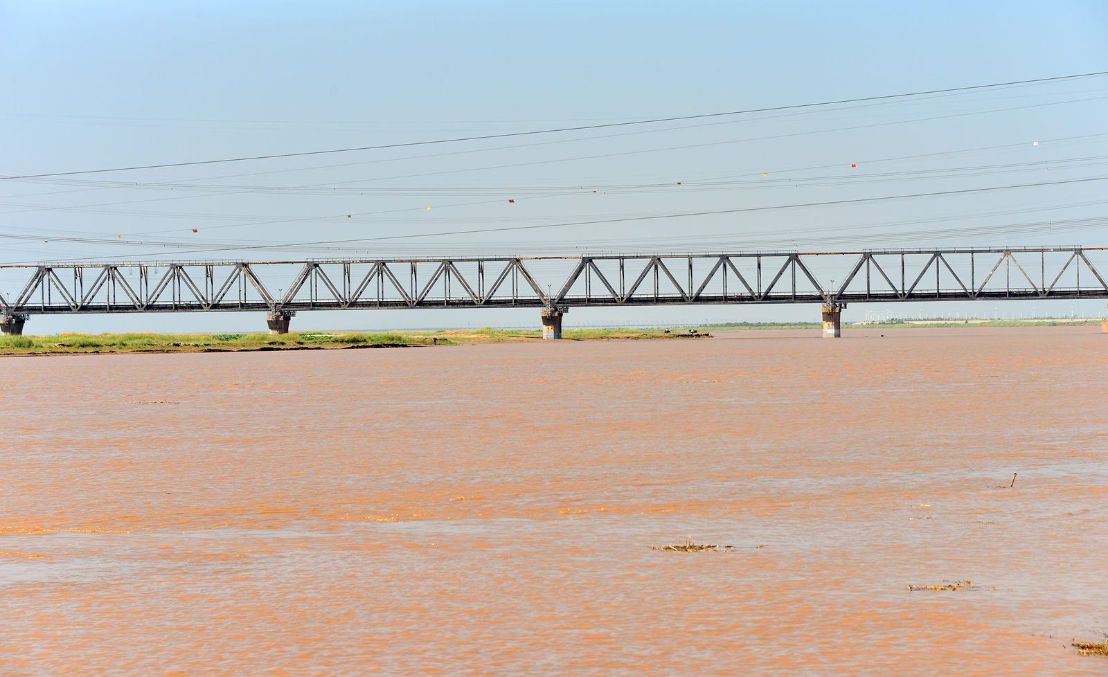 包神铁路黄河大桥